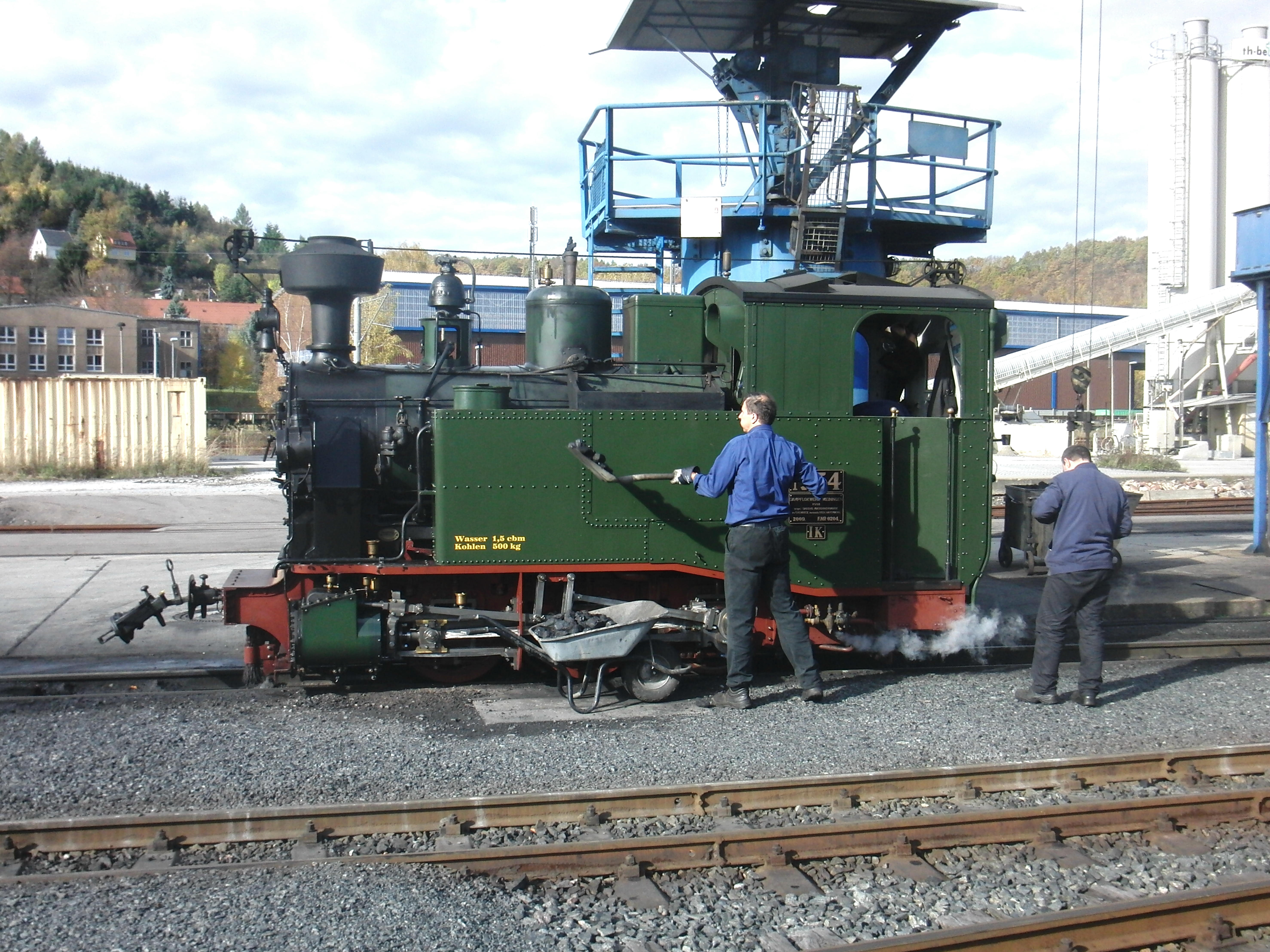 Neubau der sächsischen Schmalspurlok I K Nr.54. Hier bei der Vorbereitung für die nächste Fahrt. Man beachte die manuelle Bestückung mit Kohle.